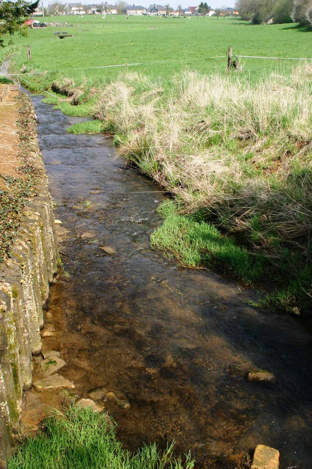 D'Millebaach zu Kënzeg Am Pad. Hannen am Bild d'Haiser op der Schock.